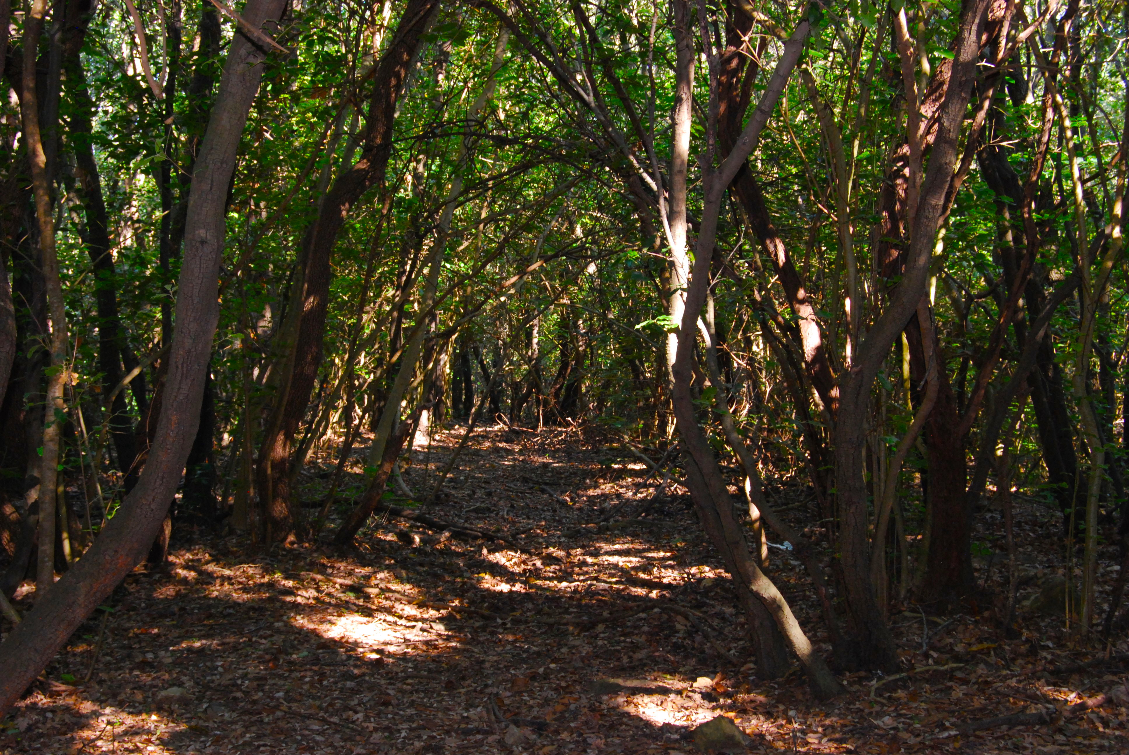 parco provinciale dei Monti Livornesi (Q3895720)